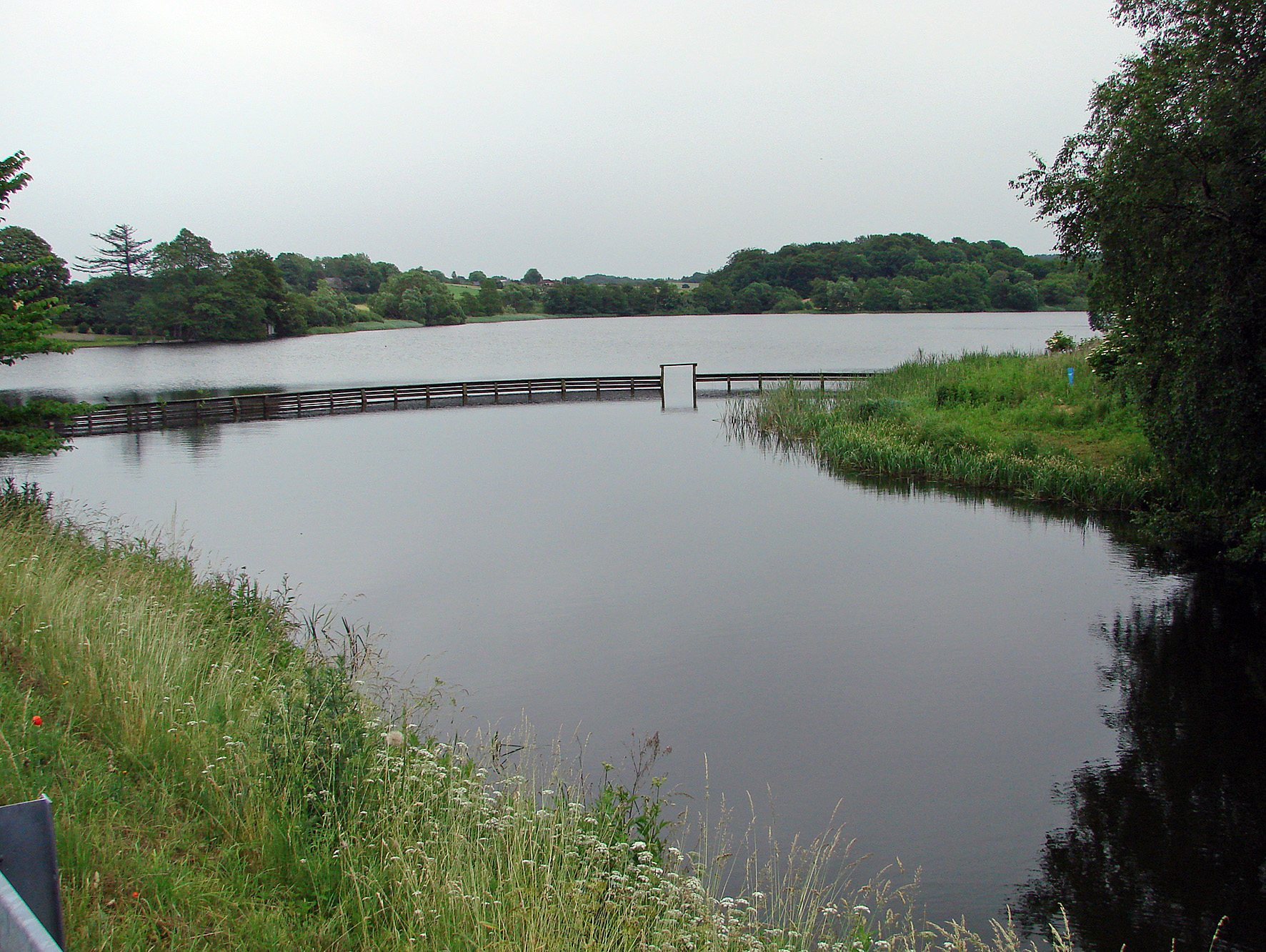 Vestbirk Sø er den sidste af tre kunstige søer, der opstod ved opstemningen af Gudenåen da man i 1925 byggede Vestbirk Kraftværk.